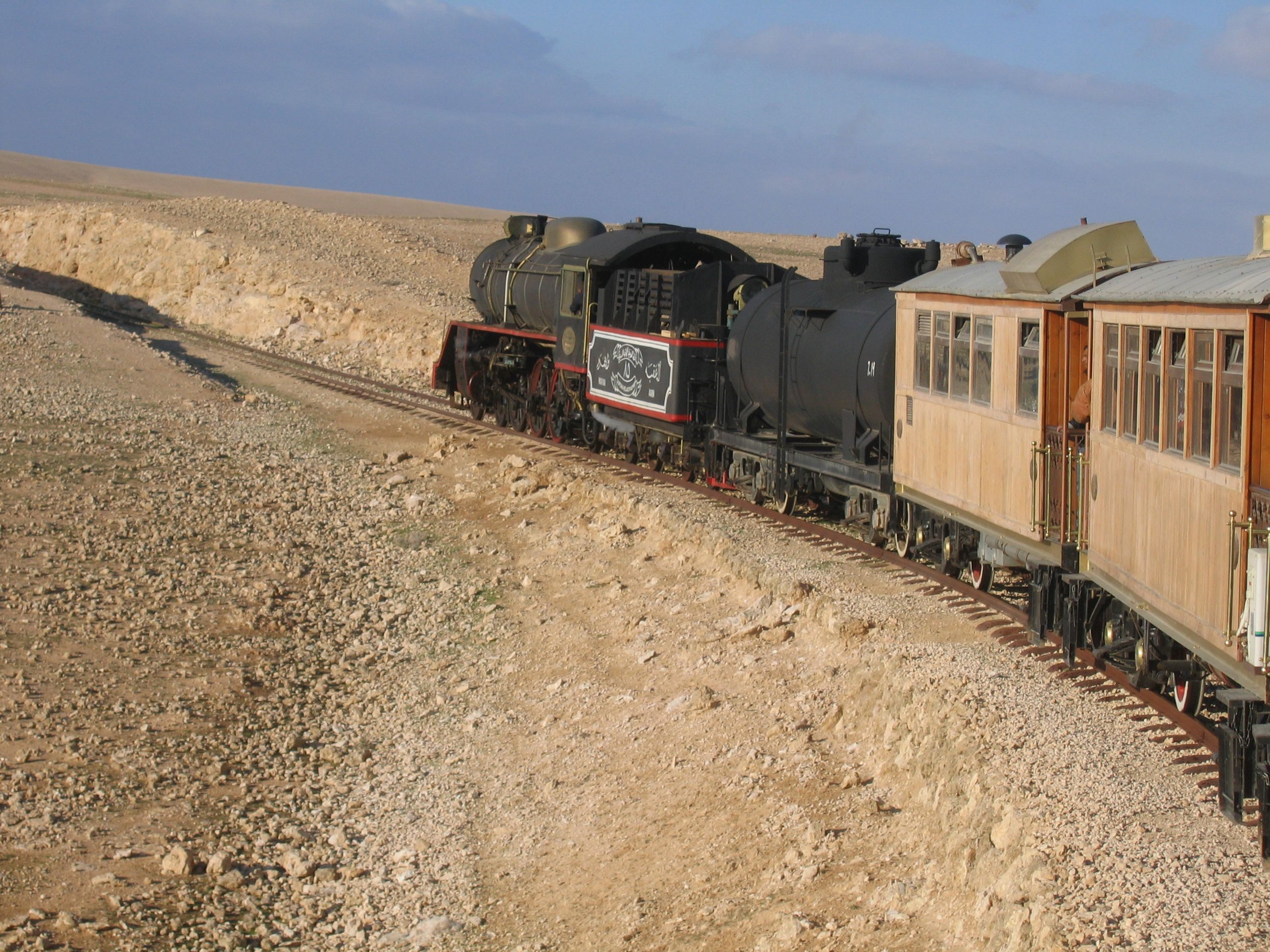 JHR Dampfsonderzug, Lok mit Wasserwagen